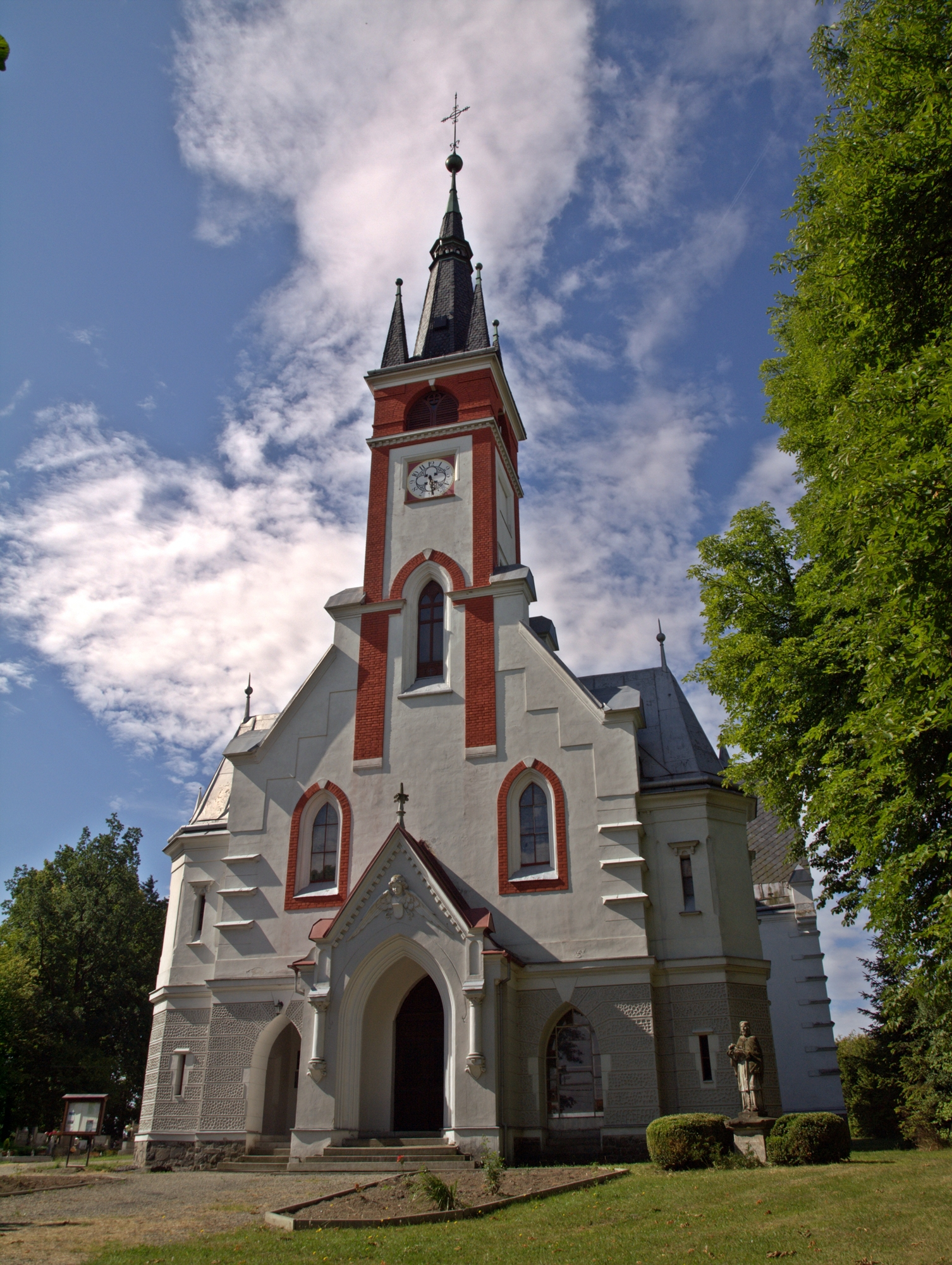 Kostel svatého Antonína Paduánského, Melč.